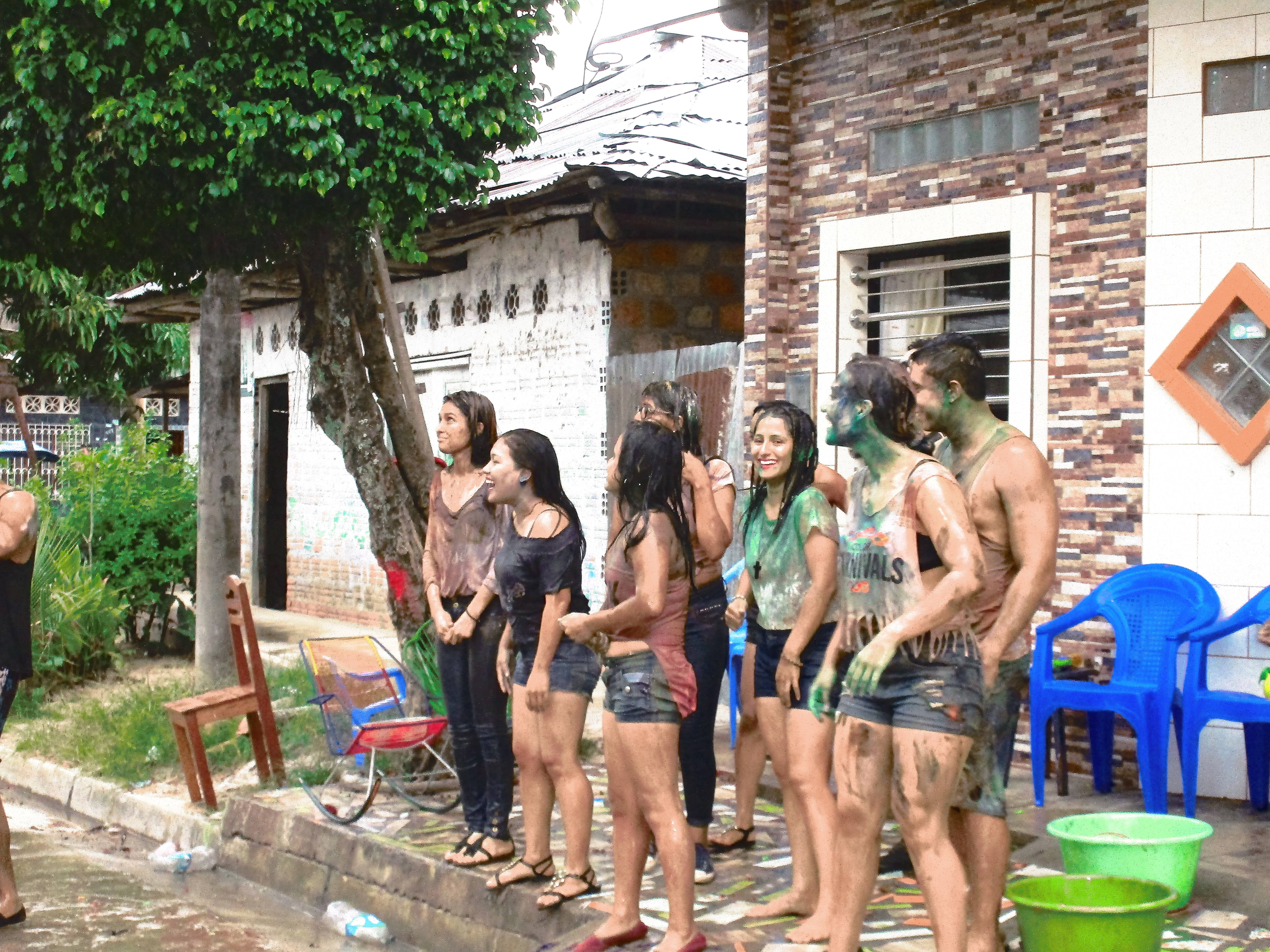 Loretanos